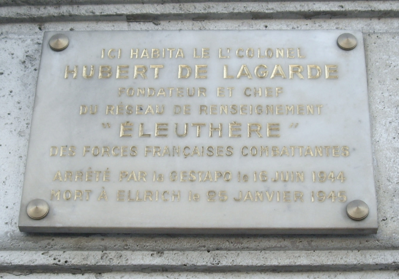 Plaque apposée au n° 7 du quai Voltaire, Paris 7e, où habita le lieutenant-colonel Hubert de Lagarde (1898-1945), fondateur du réseau Éleuthère, mort en déportation.